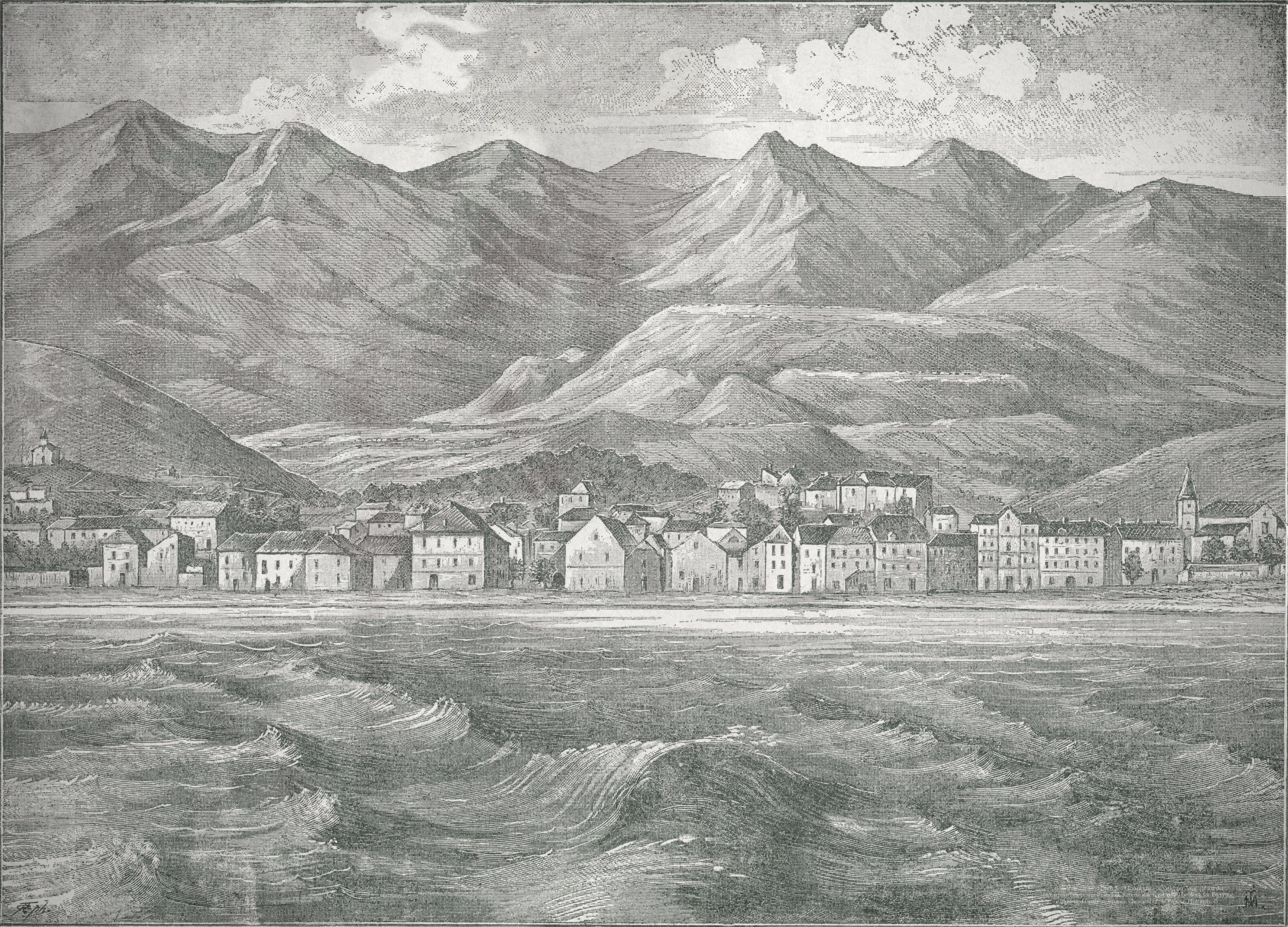 Karlobag grad Vienac Hrvatska godina 1880.